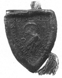 Hermán nb. Lampert országbíró pecsétje, 1322